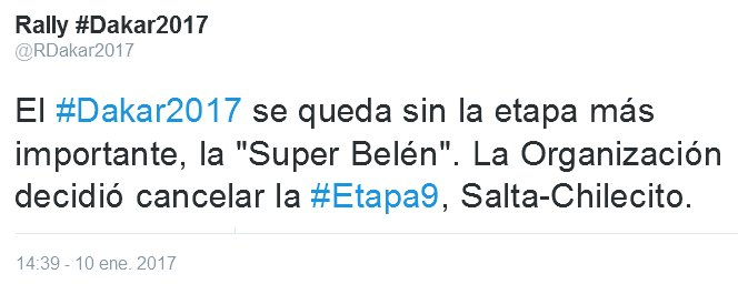 Twiter de la Organización del RDakar - Cancelando Etapa 9 - 10-1-2017